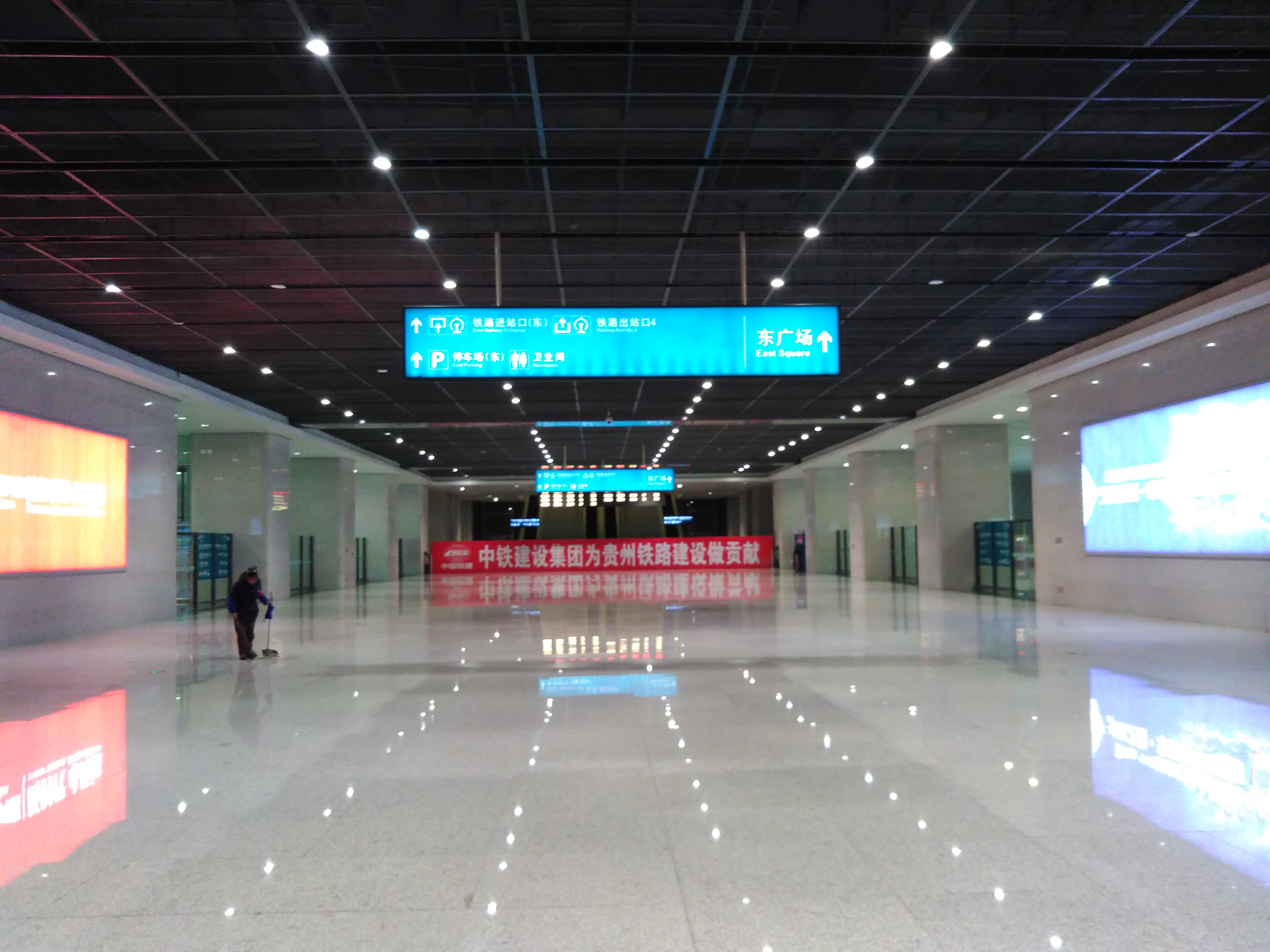 中文（中国大陆）: 贵阳北站到达层